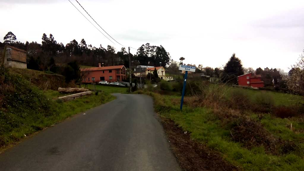 Acceso a Silva, Neda.